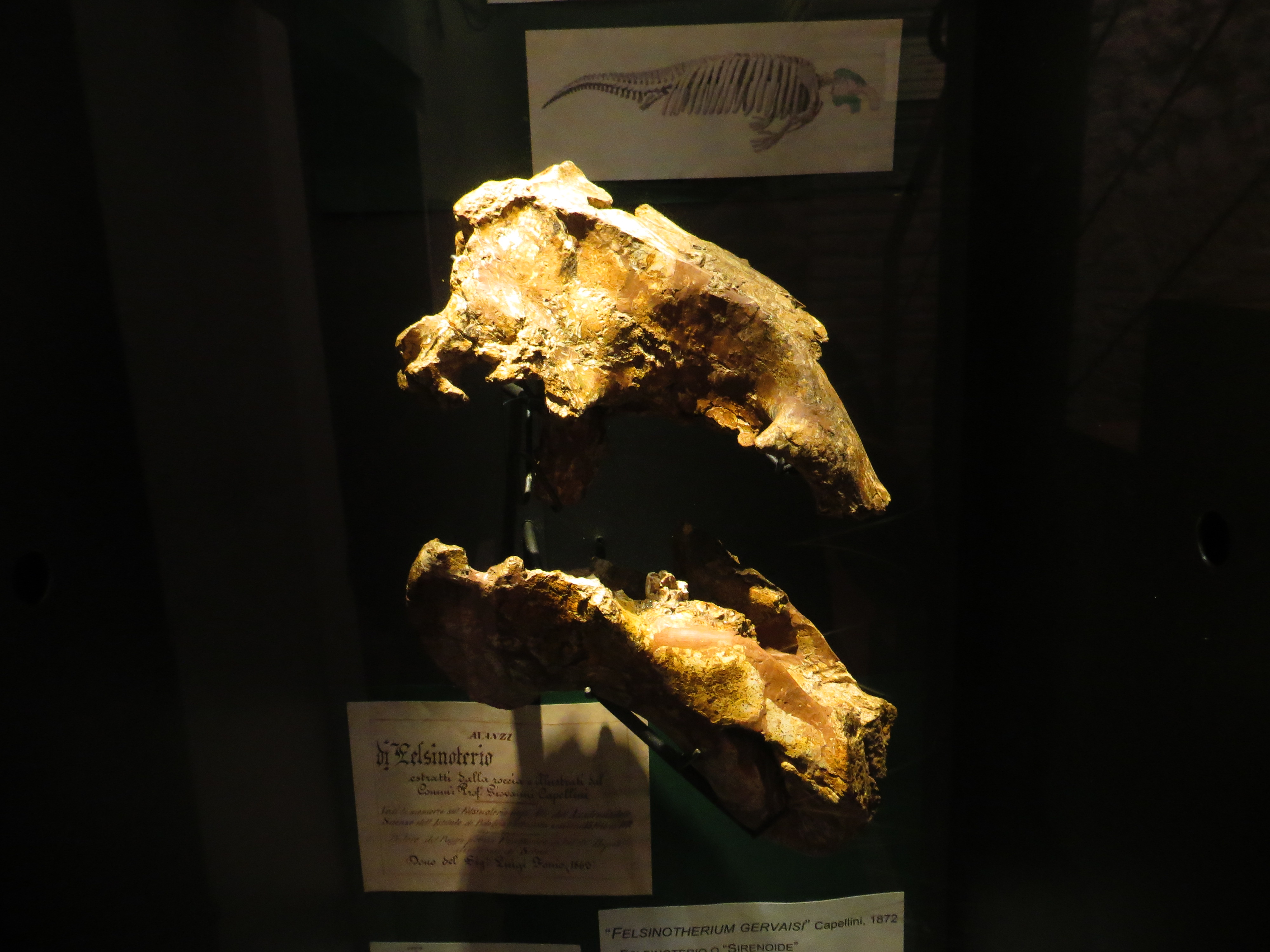 Fossil - Took the picture at Accademia dei Fisiocritici, Siena